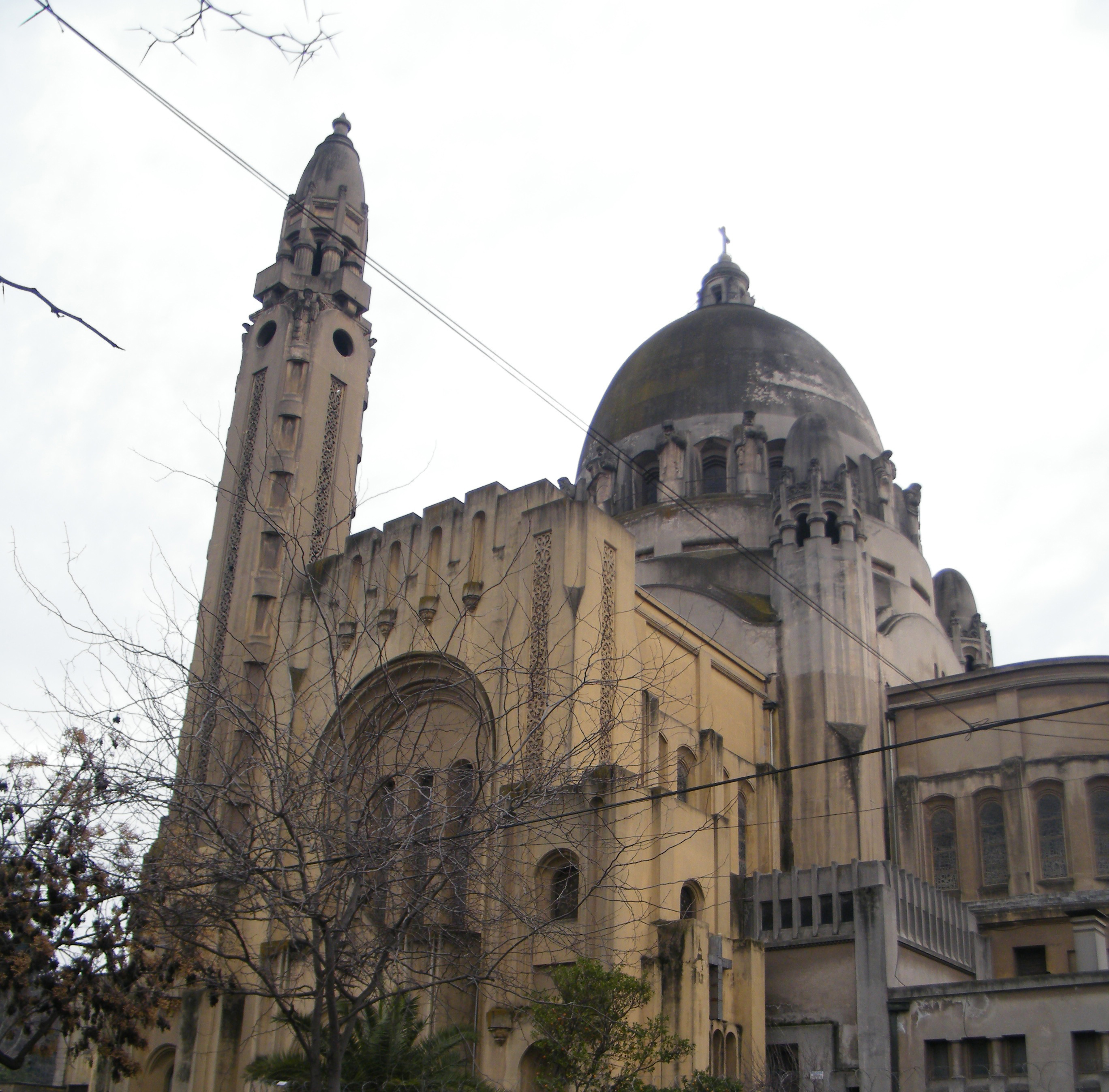 Fotografias del Santuario de Lourdes, incluyen imágenes de la Basílica, Gruta y Convento